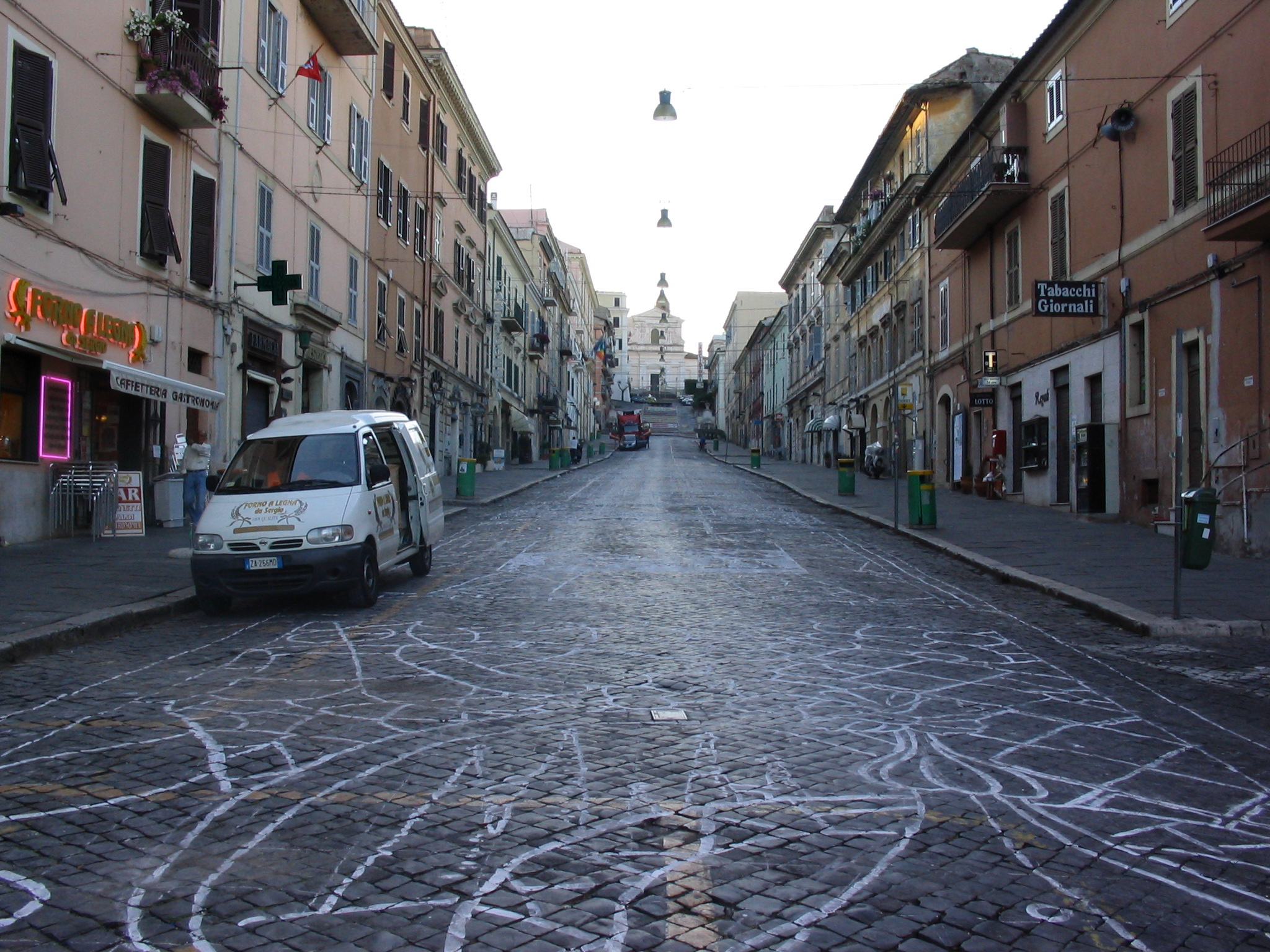 Genzano di Roma, Infiorata, Contorni delle figure tracciate col gesso sulla Via Livia